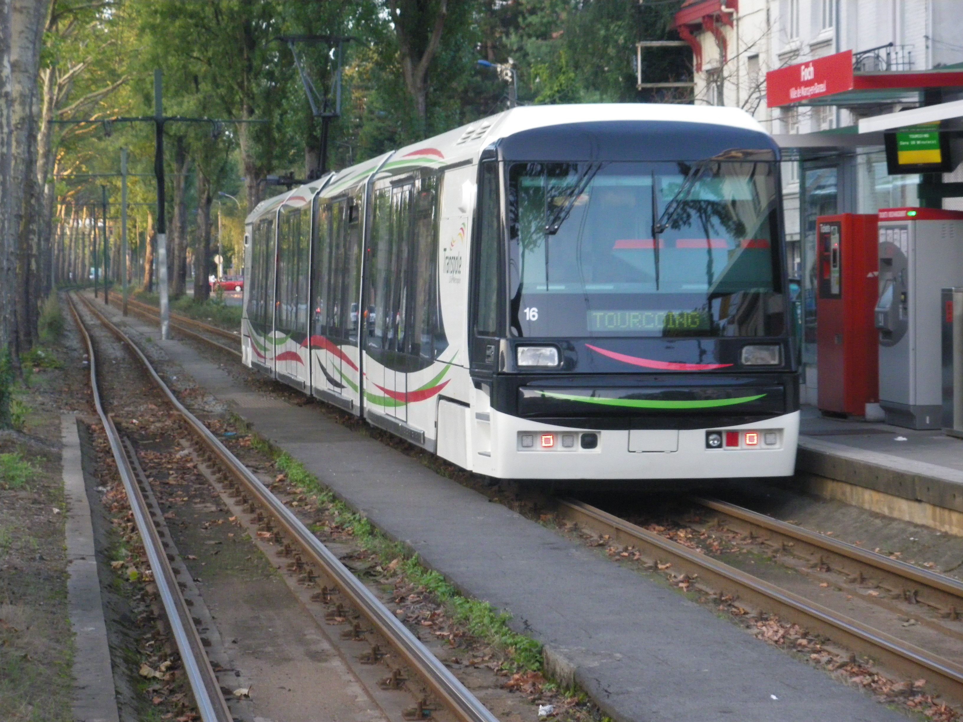 Vue d'une nouvelle rame (2013) du tramway de Lille-Roubaix-Tourcoing à hauteur de la station "Foch" à Marcq-en-Baroeul.